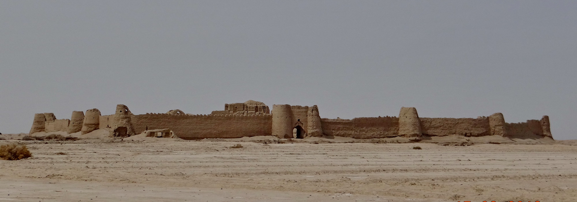 قلعه رستم، در ۷۰ کیلومتری جنوب غربی شهرستان زابل، بنایی وسیع و مربوط به دوران اسلامی است. در این منطقه بقایای یک شهر باستانی با آجرکاری و ساختمان‌های متعدد و سر در ورودی، برج نگهبانی و ۱۵برج دفاعی است. این قلعه بزرگ‌ترین قلعه دوران اسلامی در این منطقه و عظمت آن جنبه افسانه‌ای و نسبت دادن آن به نام آورترین شخصیت سیستان یعنی رستم شاهنامه است. مجموعه‌ای حدود ۱۵تپه مربوط به پیش از تاریخ نیز در این منطقه وجود دارد. باستان شناسان تعدادی سکه نقره مربوط به پوراندخت پادشاه ساسانی در این منطقه کشف کرده اند.